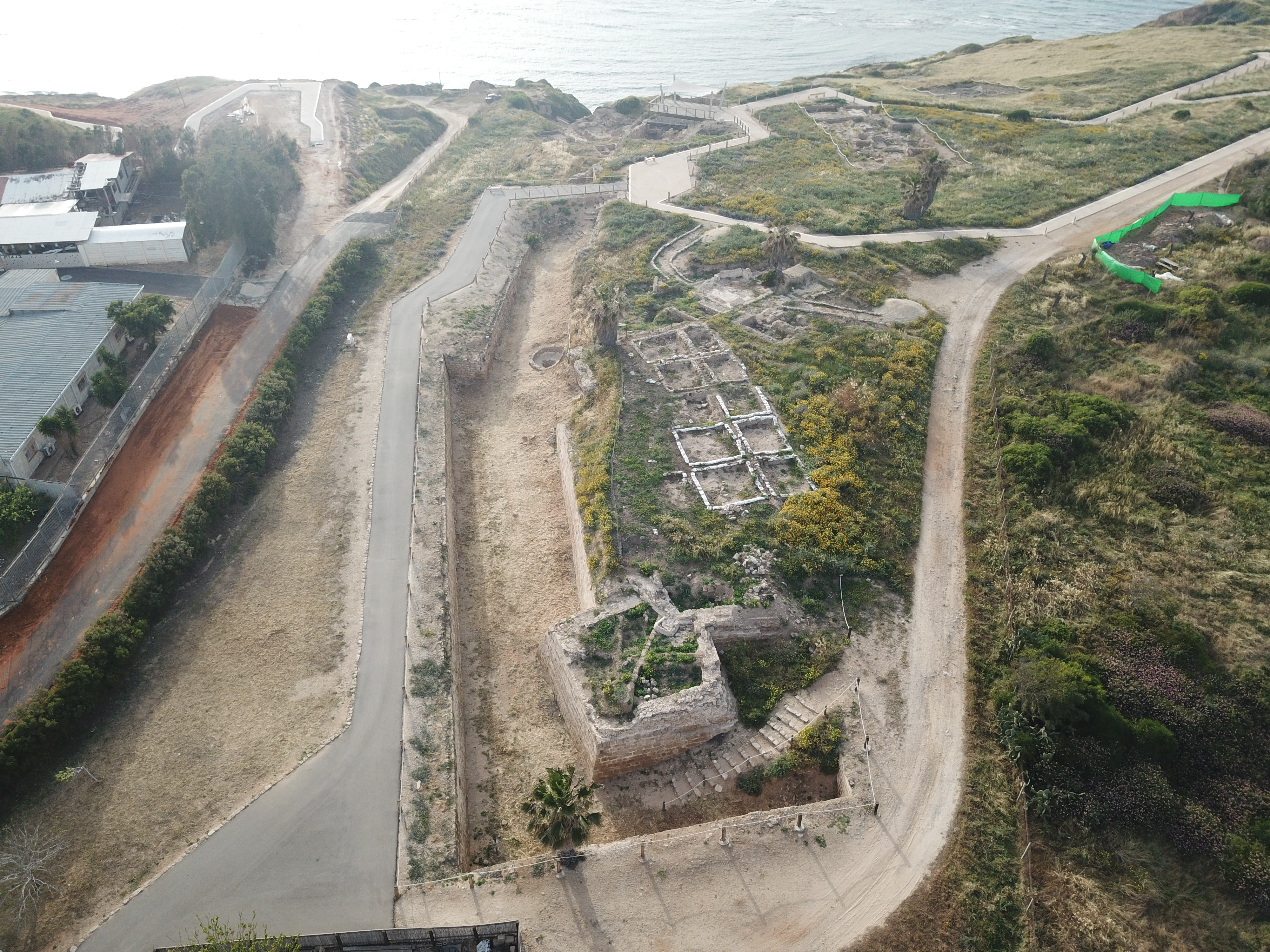 החומה והחפיר הדרומיים של העיר הצלבנית אפולוניה (ארסור)